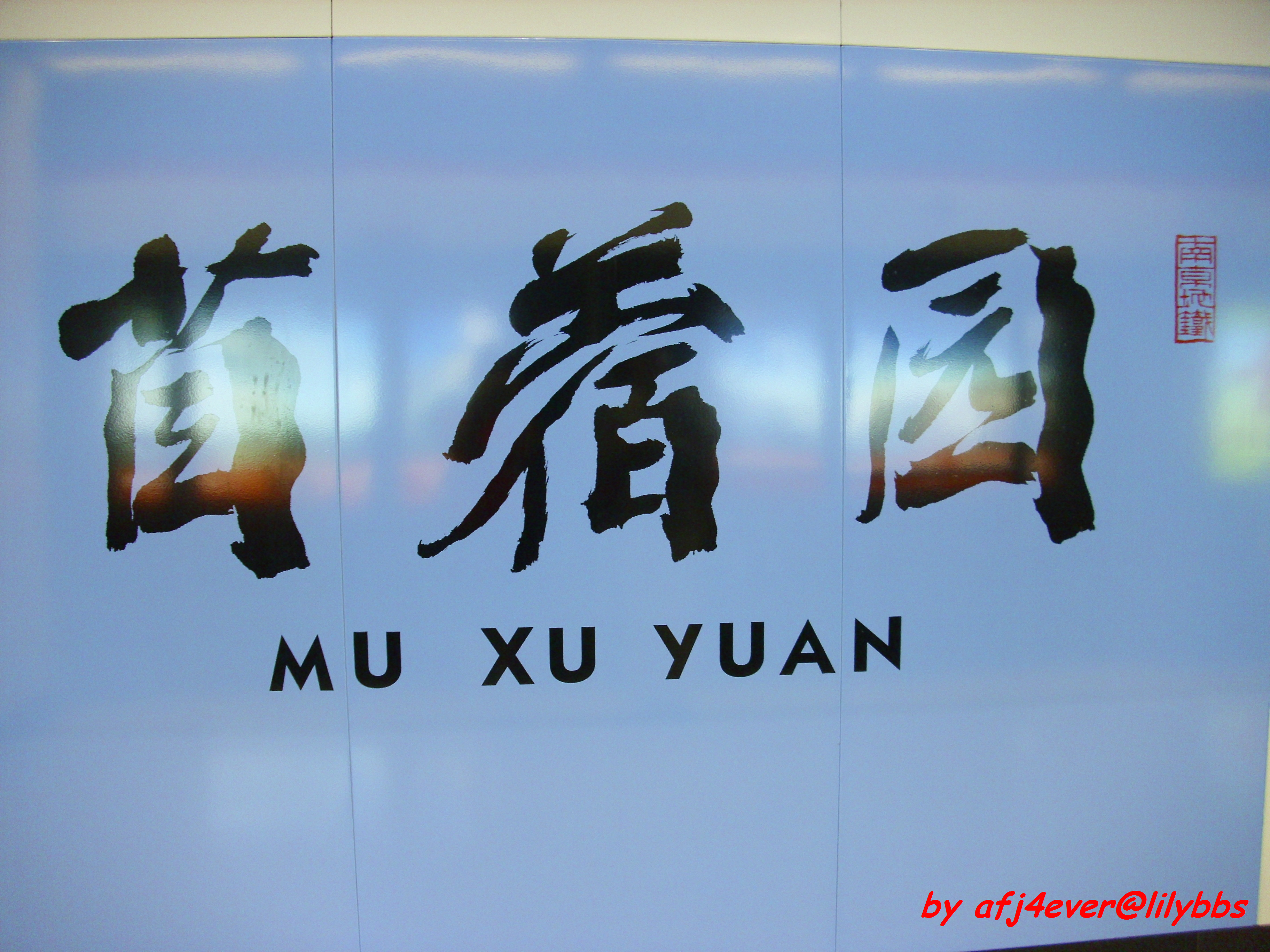 南京地铁2号线 苜蓿园站